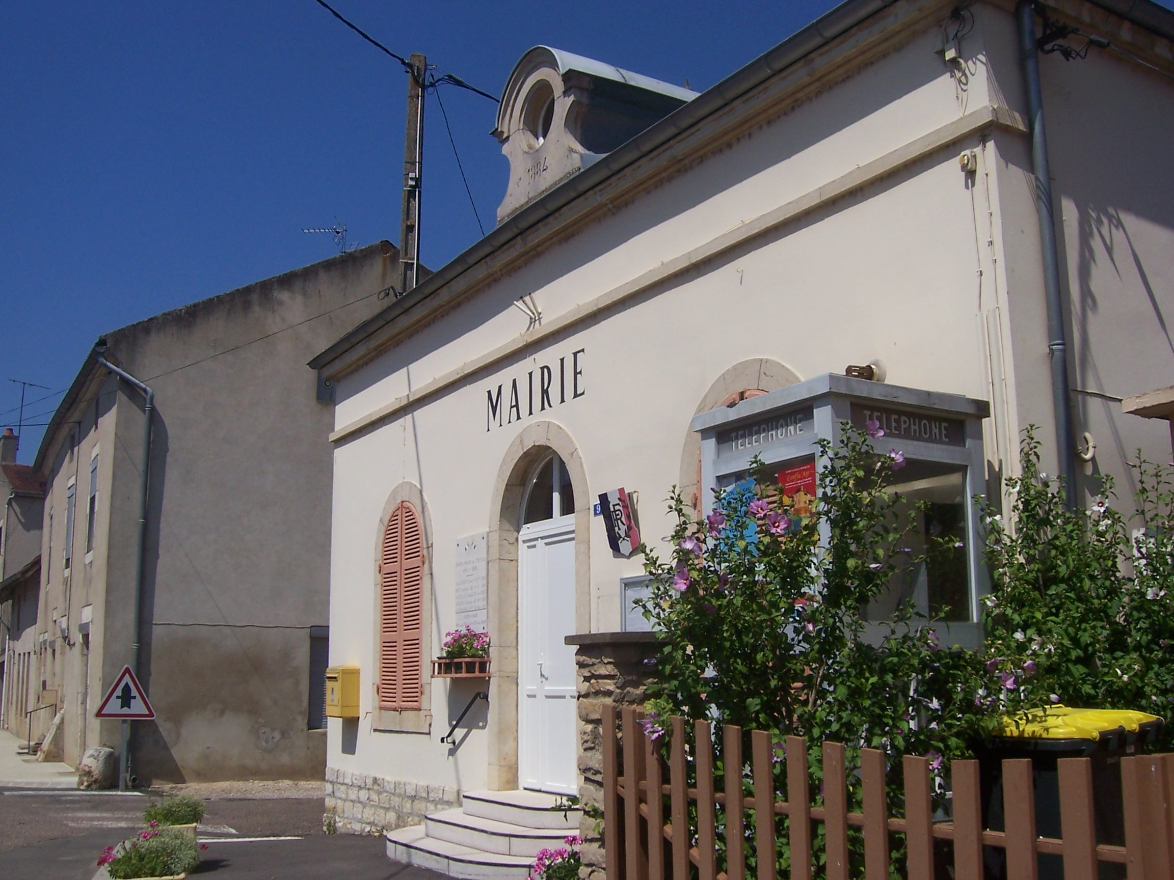 Mairie des Bordes